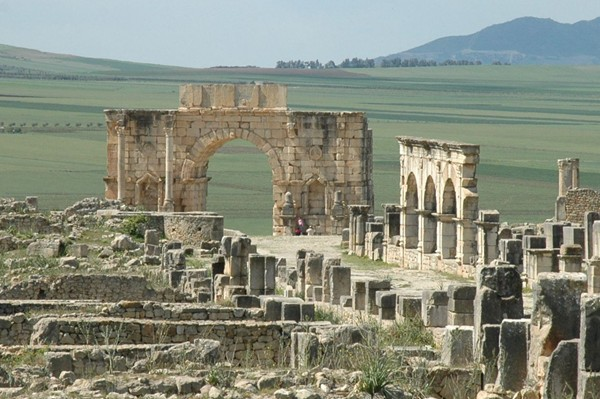 Volúbilis